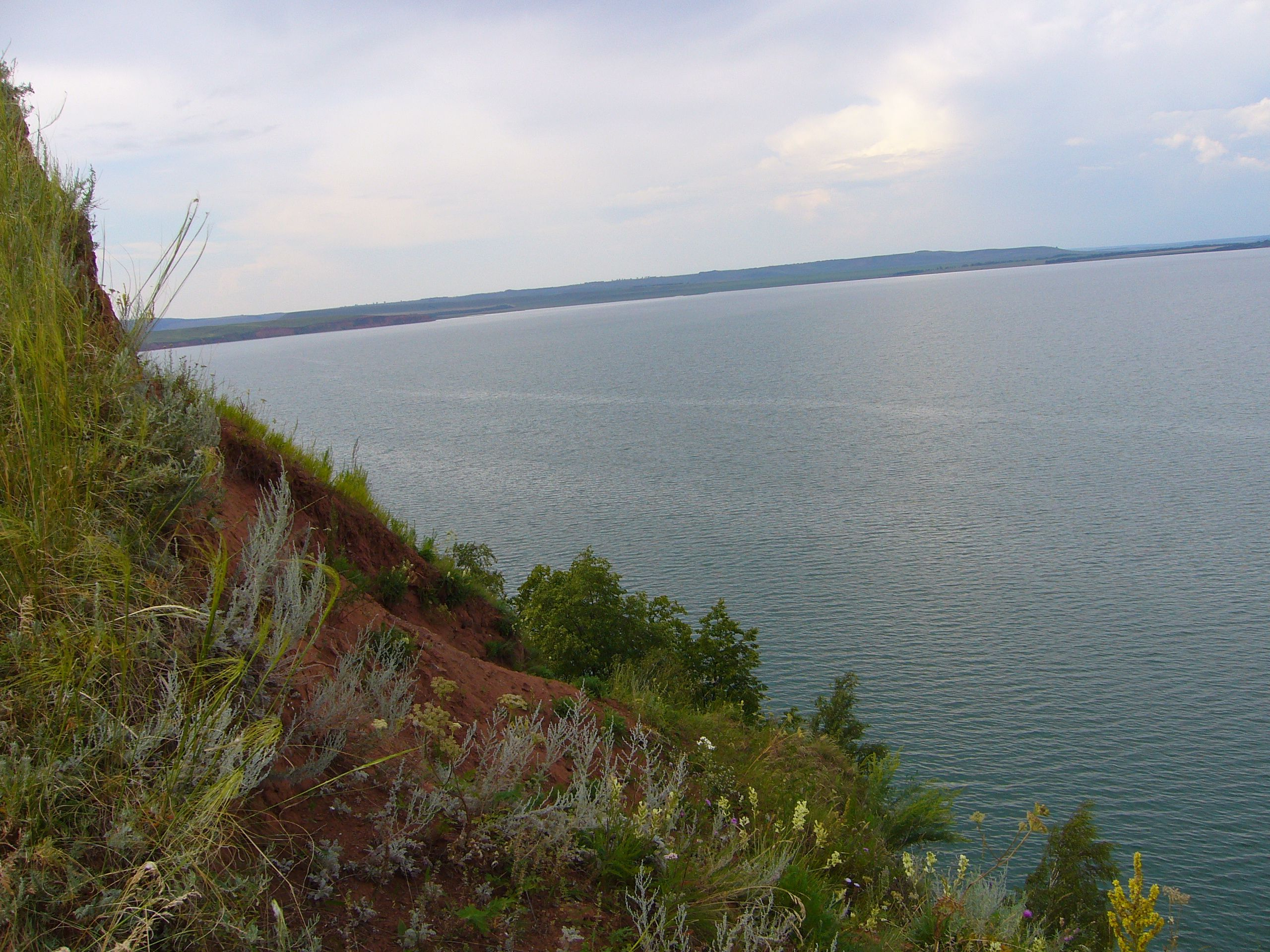 Озеро Аслыкуль